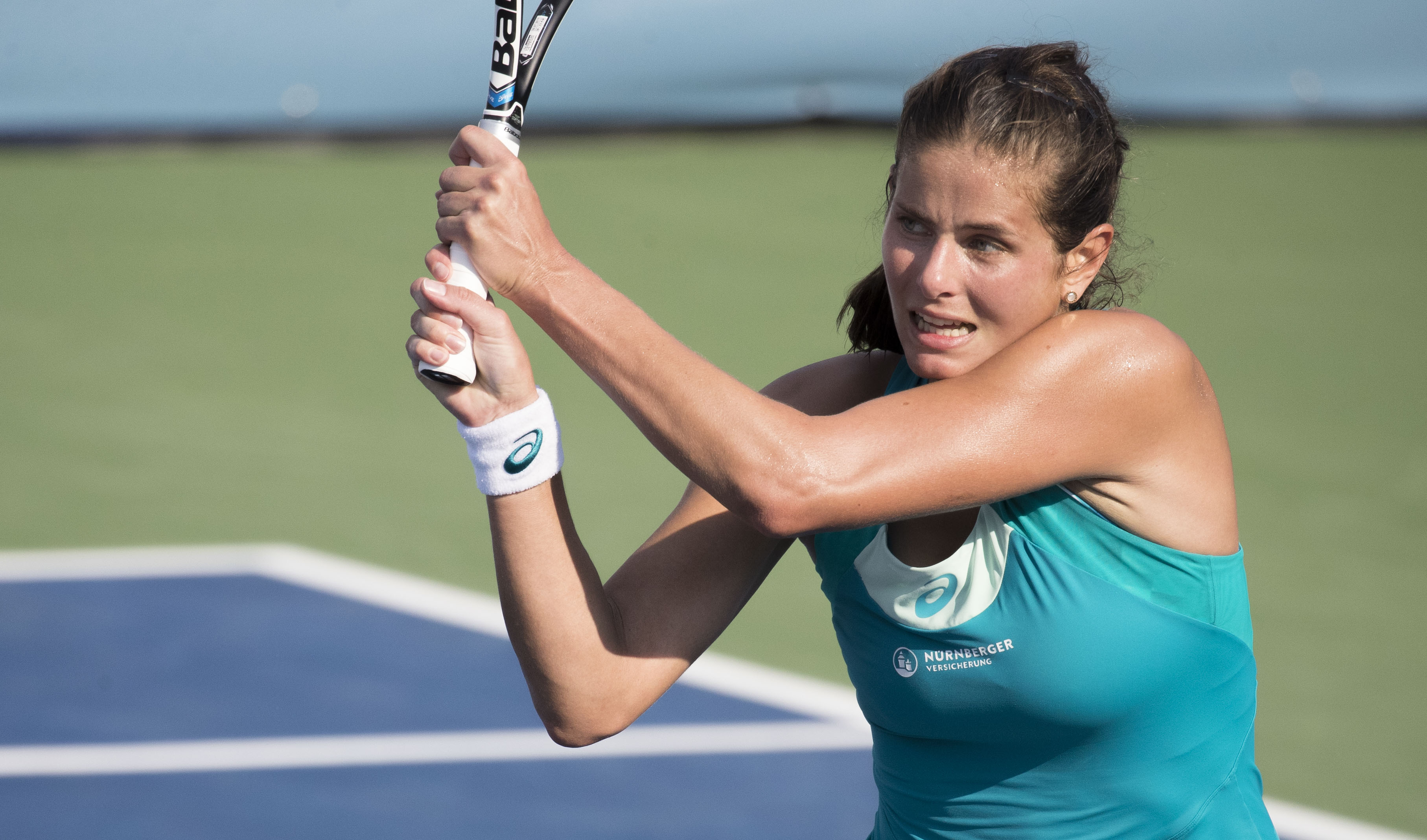 Citi Open Tennis 2017